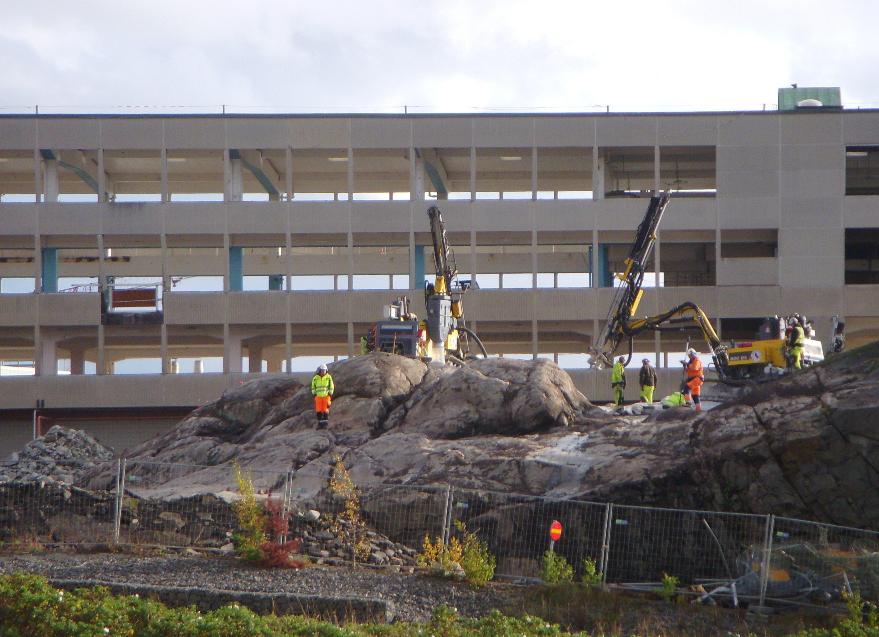 Gustavsbergs porslinsfabrik rivning av huvudbyggnad